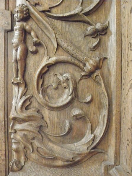 Jouée des stalles hautes méridionales de la collégiale Saint-Martin de Champeaux (77). Détail.